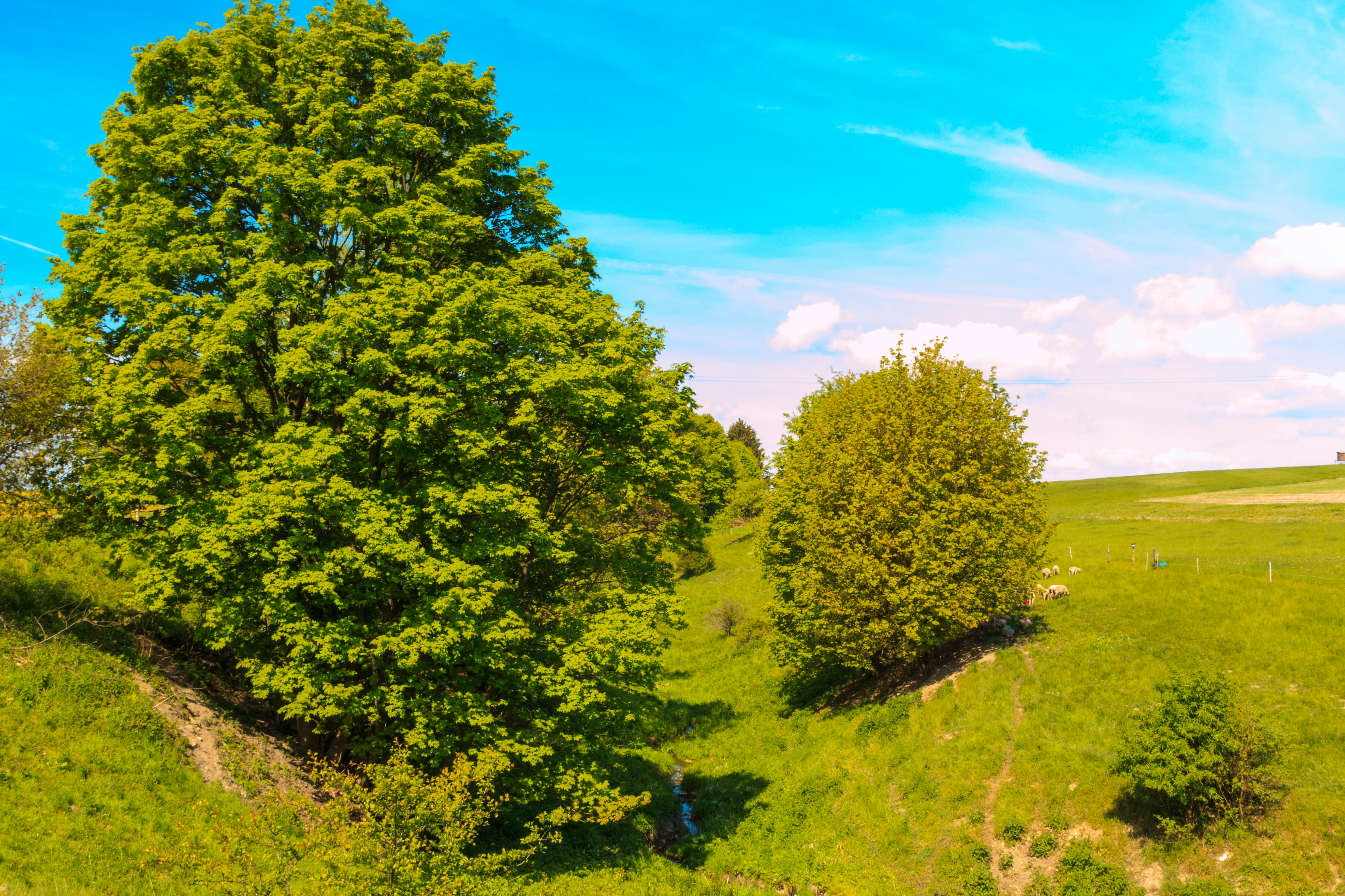 Přírodní rezervace Štíří důl Project: Chráněná území.